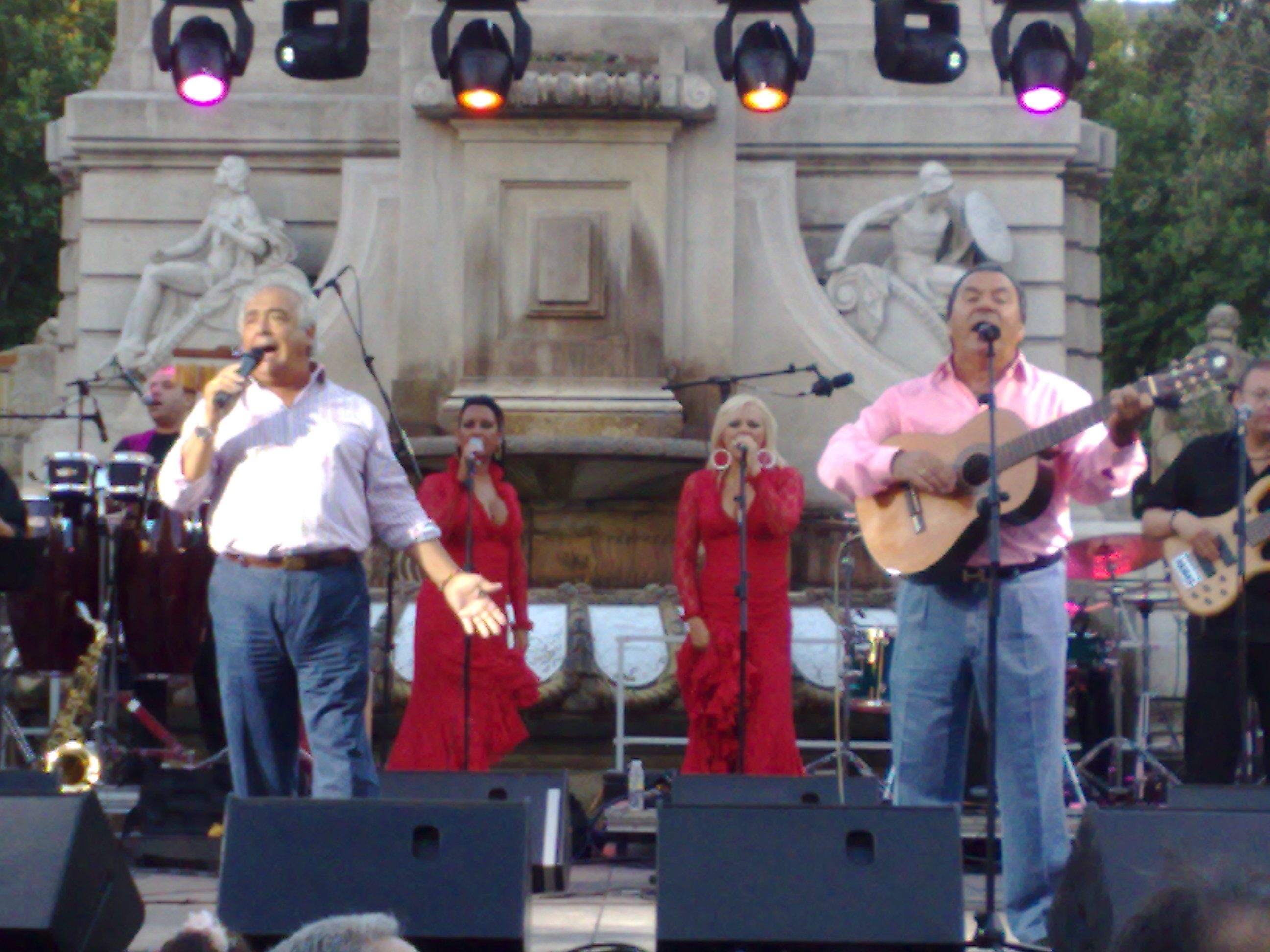 Actuación el 30-07-2009 de Los del Río en la Plaza España de Madrid (España)